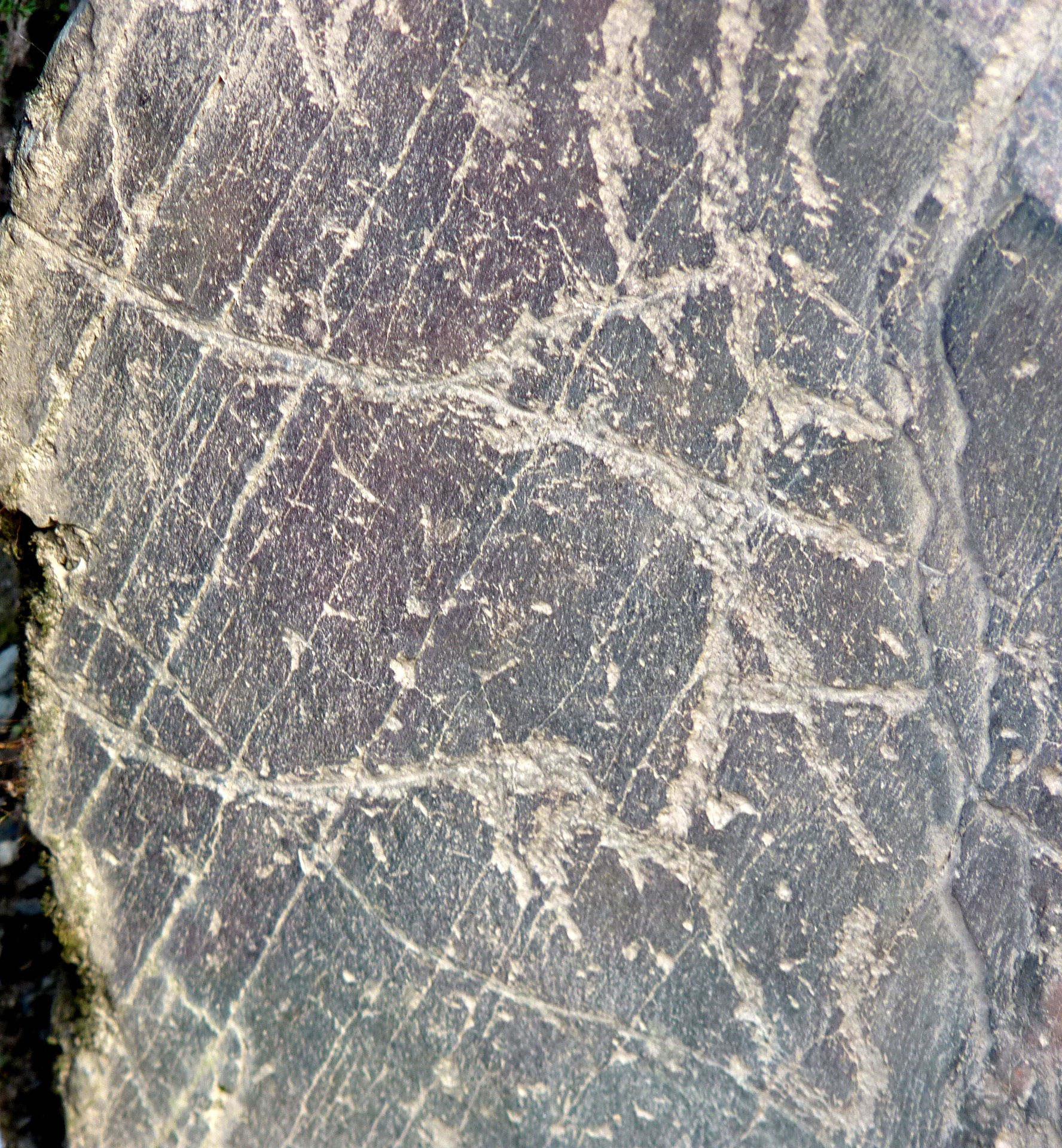 Conjunto dos sítios arqueológicos no Vale do Rio Côa - Núcleo de Arte Rupestre da Penascosa